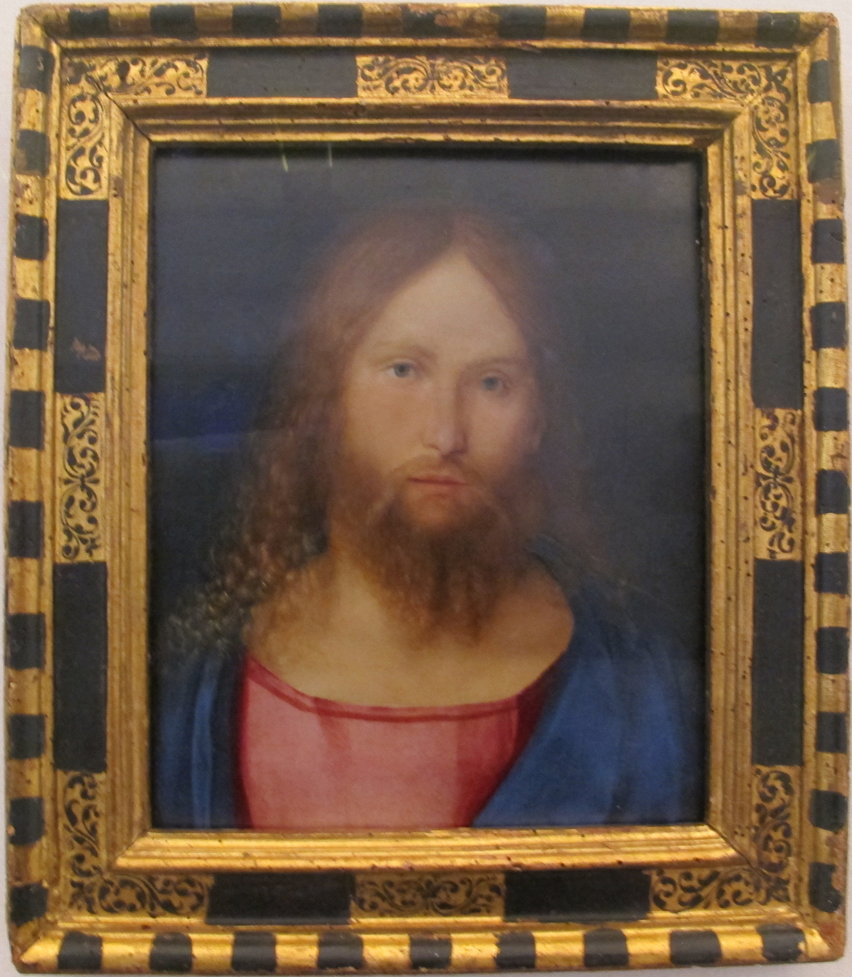 Jacopo de' barbari, testa di cristo, 1503 ca